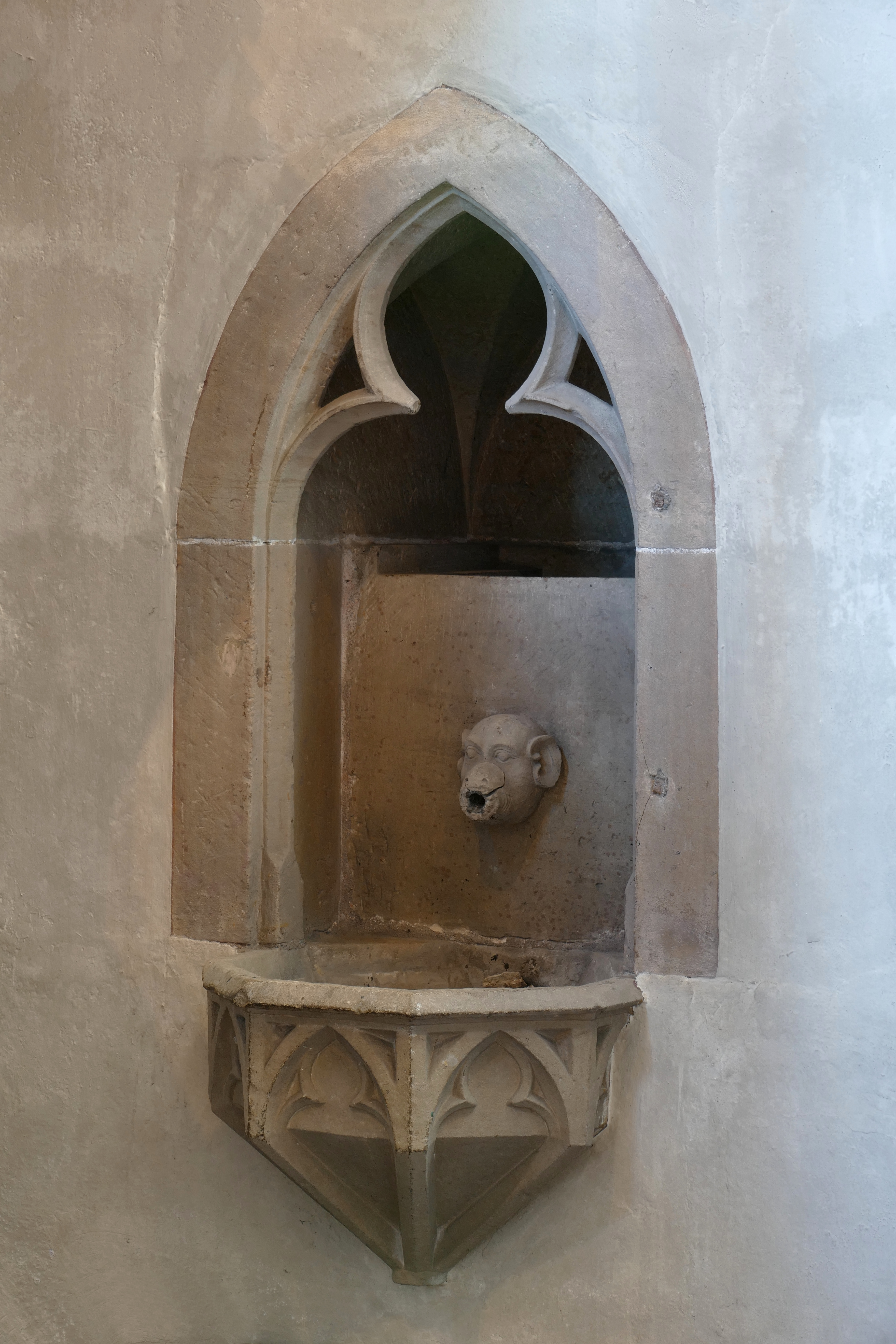 Alsace, Bas-Rhin, Rosenwiller, Église Notre-Dame de l'Assomption (PA00084907, IA00075624). Lavabo gothique en niche (XVe)